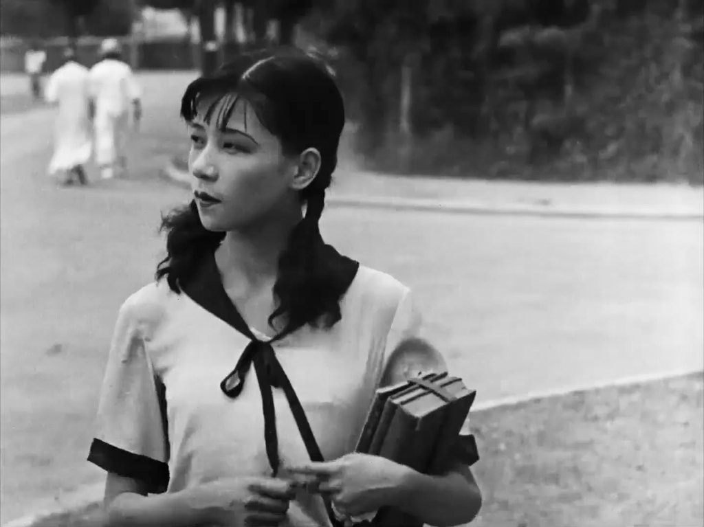 Escena de la película "Amor y Deber" 1931